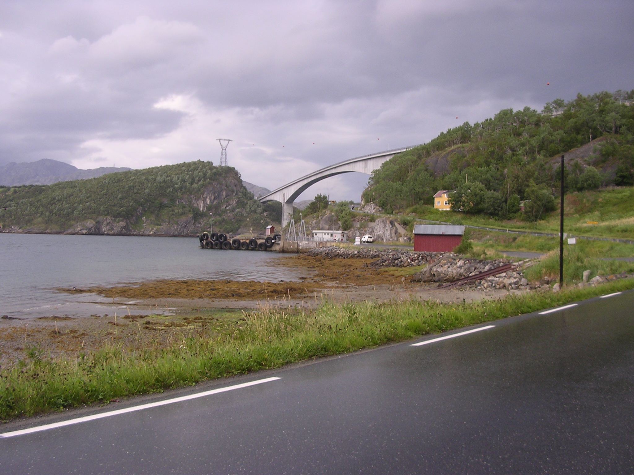 Sundøybrua i Leirfjord kommune, Nordland